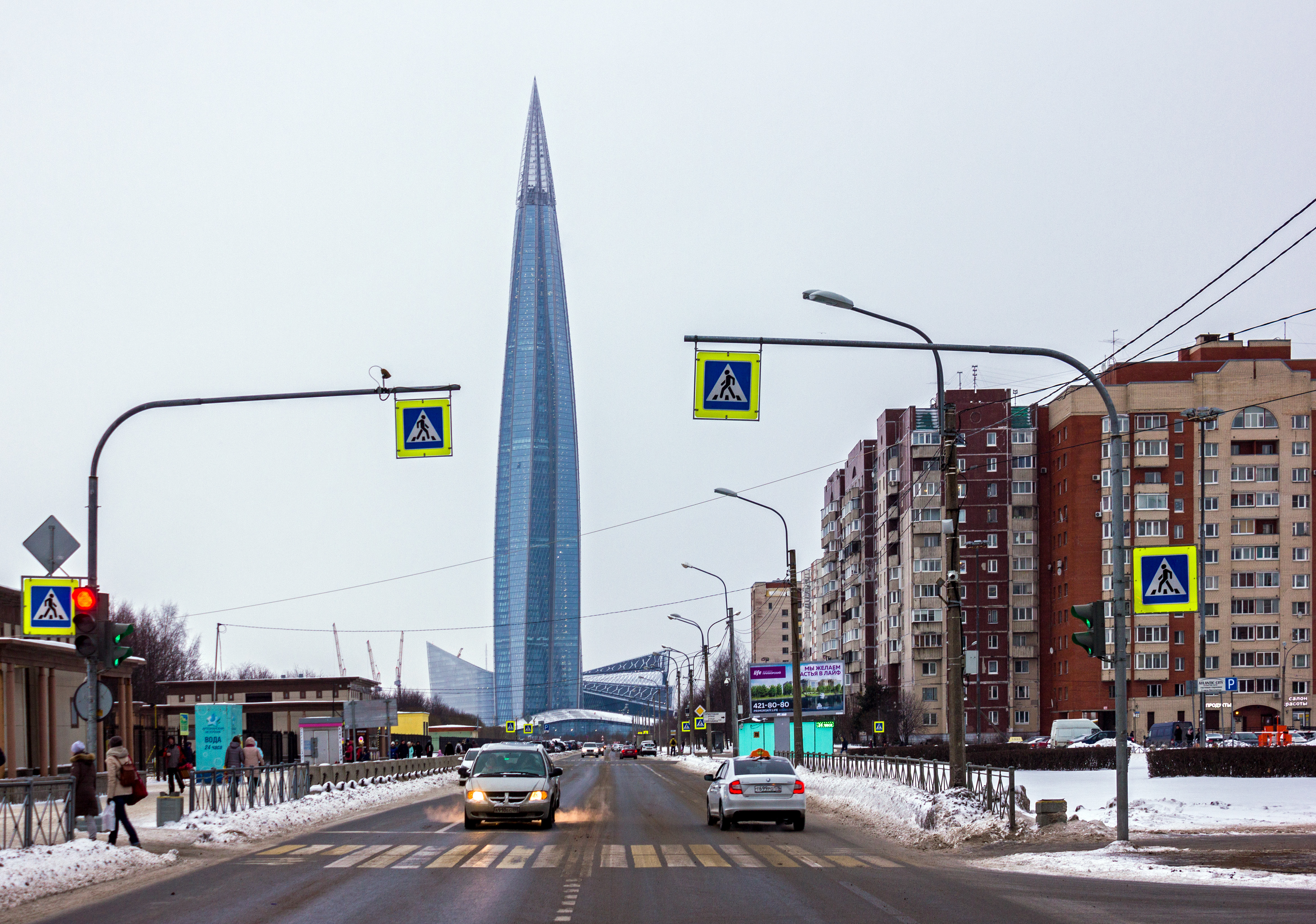 Санкт-Петербург. Вид на Лахта-центр с Приморского проспекта.